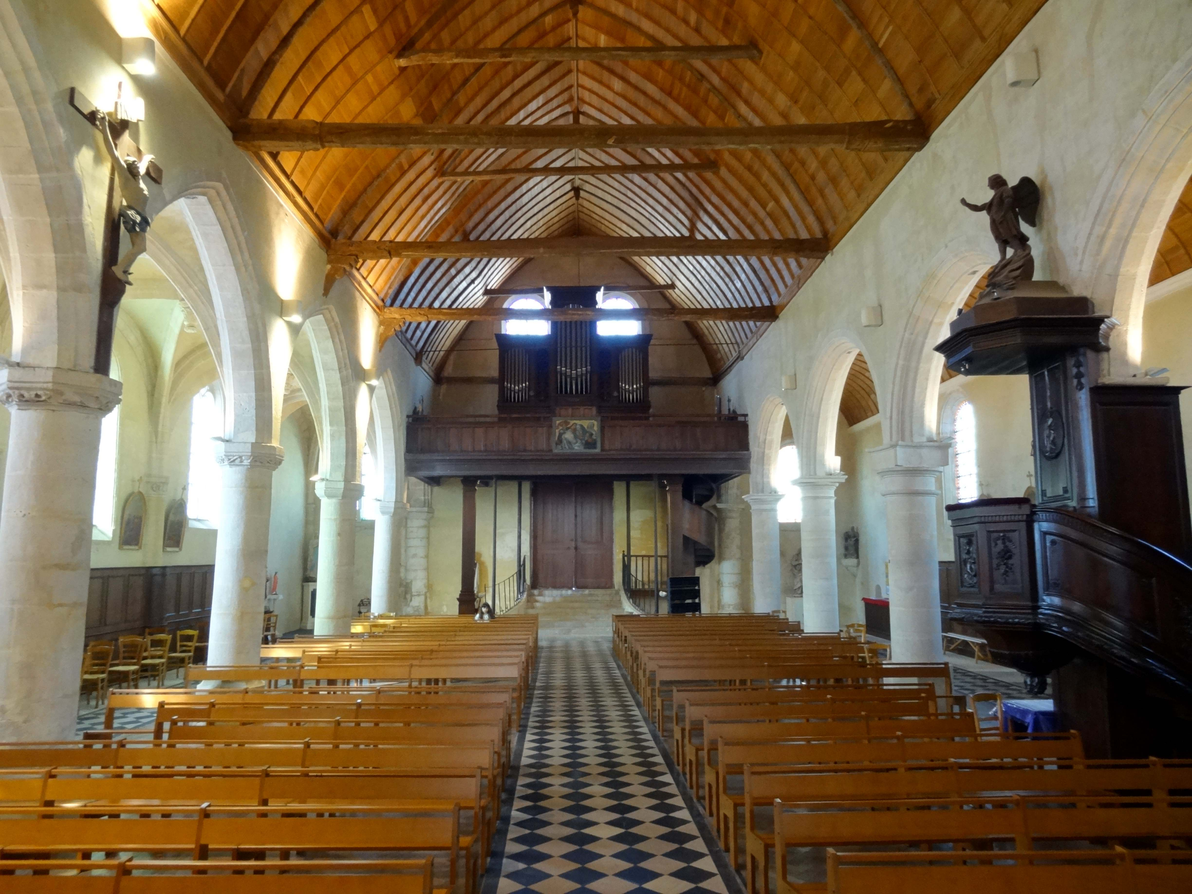 Intérieur de l'église - voir titre.